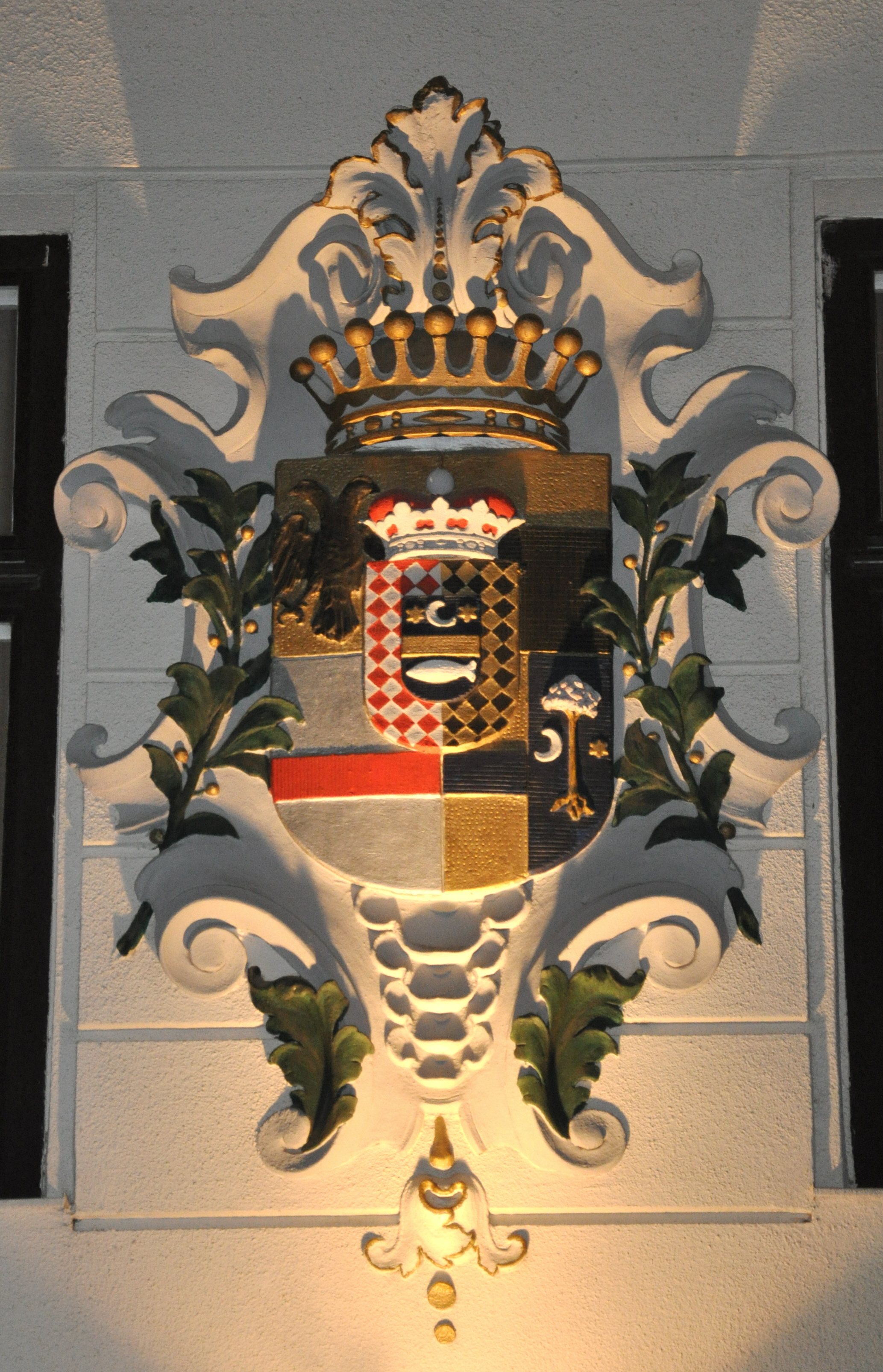 Wien-Josefstadt, Lange Gasse 49 (Hotel Zipser), Wappenrelief an der Fassade, Wappen der Grimaud von Orsay (evtl. Maximilian Joseph Friedrich von Grimaud, Graf von Orsay, k. k. österreichischer Kämmerer, Anfang 19. Jh.??)